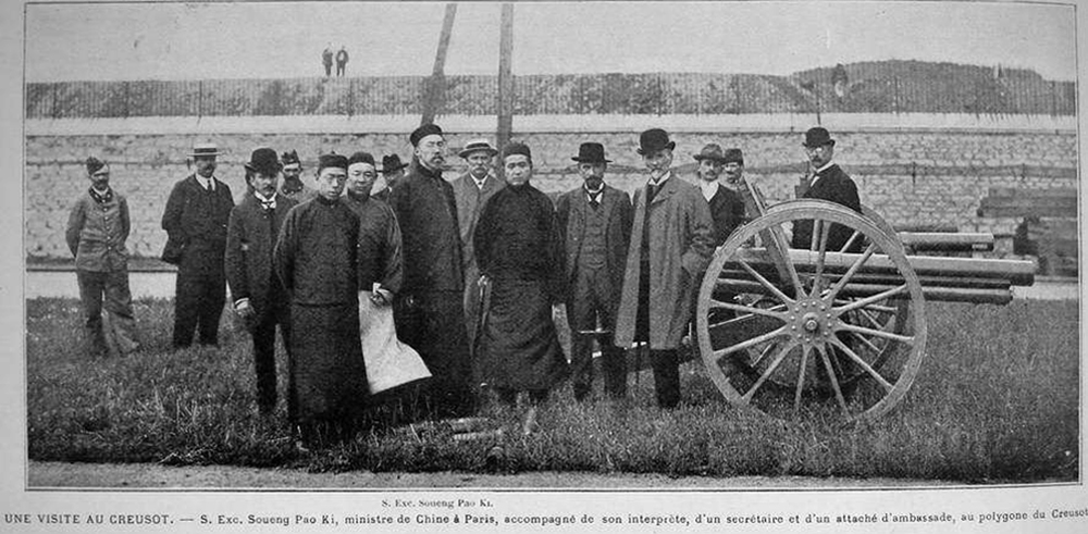 任驻法国公使的孙宝琦在巴黎访问时的合影。